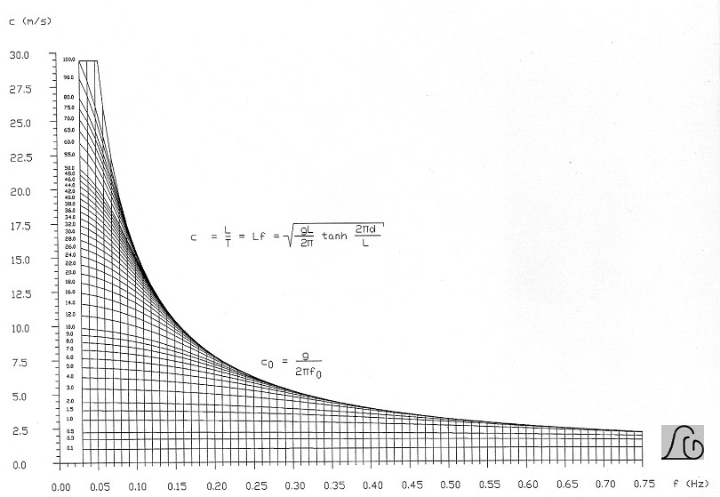 Phasengeschwindigkeit (Schwerewellen) als Funktion der Frequenz f und der Wassertiefe d, c(f,d)